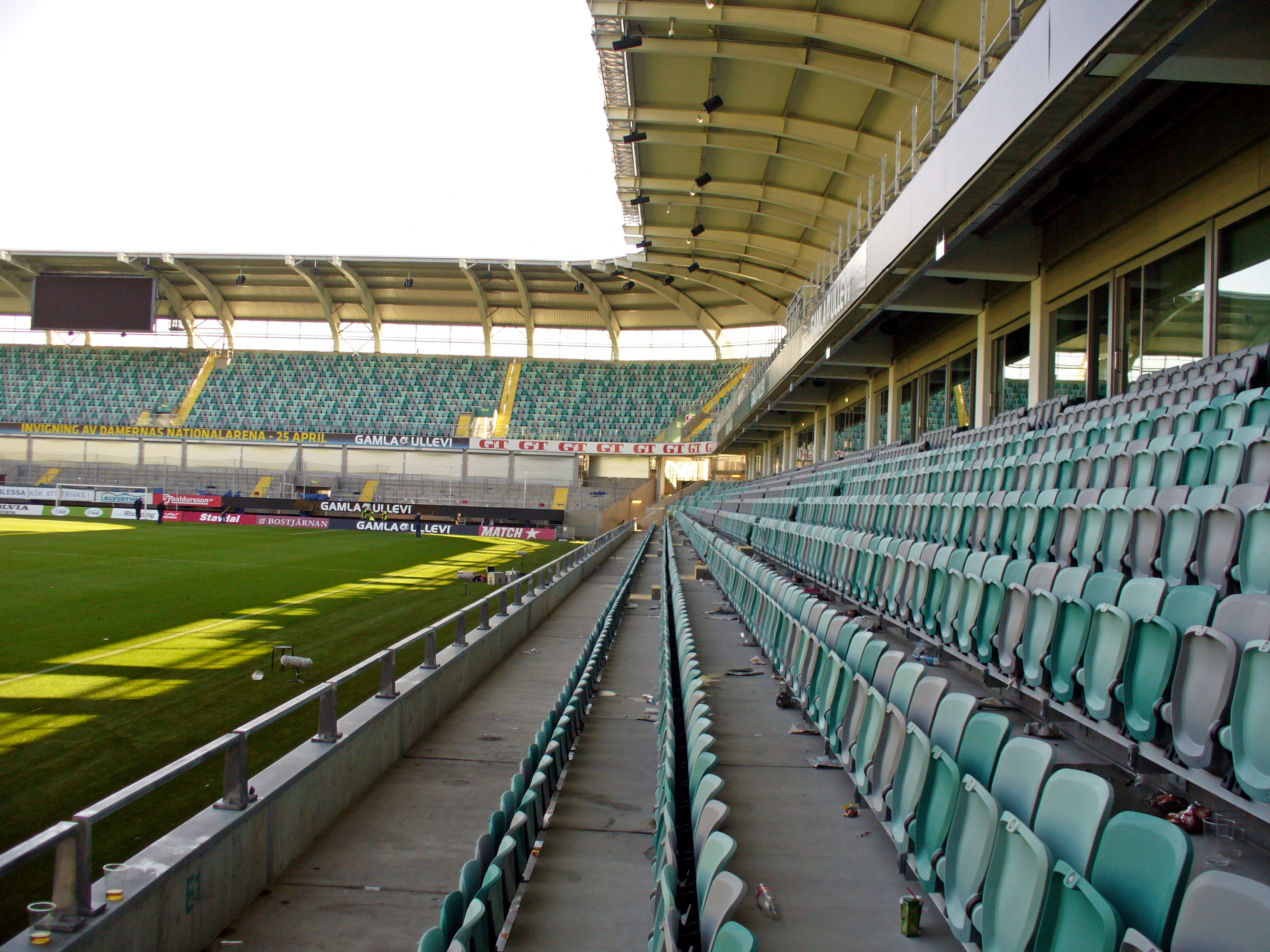 Gamla Ullevis långsida efter matchen mellan IFK Göteborg och Djurgårdens IF på påskafton 2009.